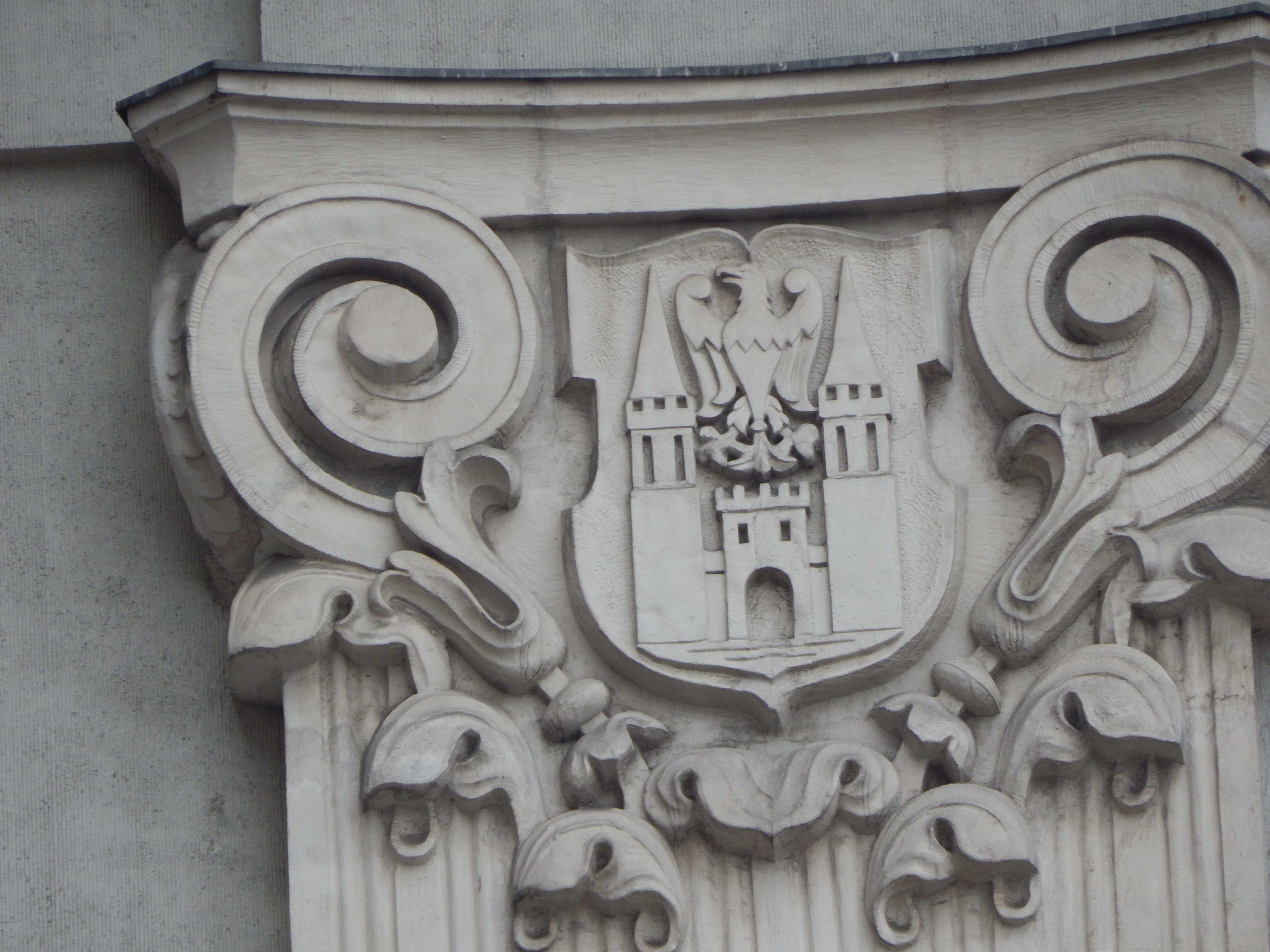 Fragment elewacji gmachu Sejmu Śląskiego - herb Cieszyna